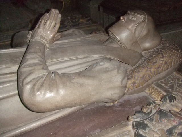 Stiftskirche St. Georg, Tübingen Detail von einem der Grabmonumente